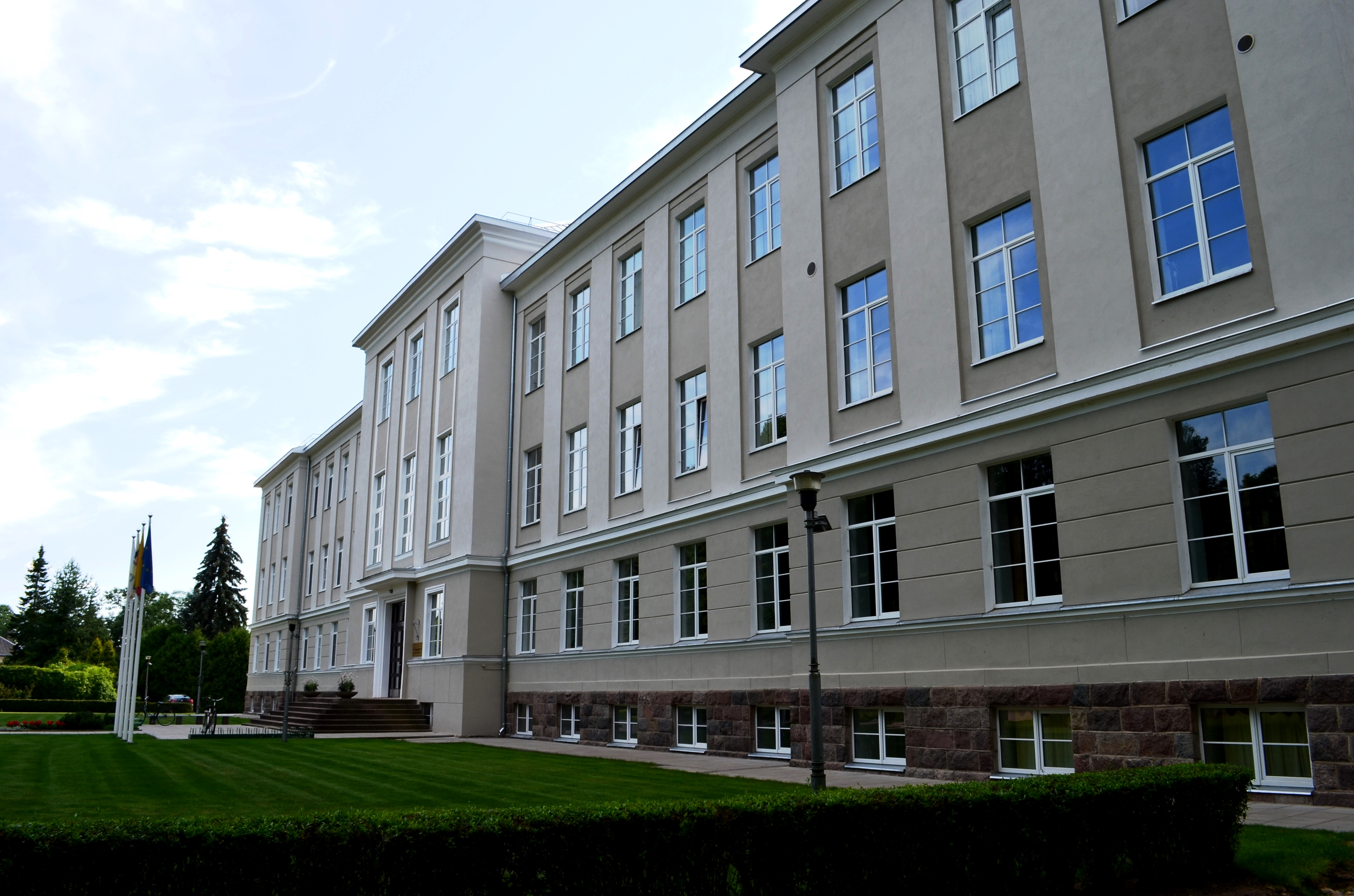 Žemės ūkio institutas, Akademija, Kėdainių raj.